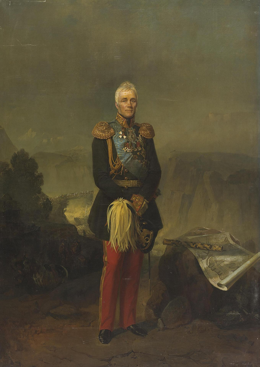 Картина «Портрет графа М. С. Воронцова» — художник Егор (Георг) Иванович Ботман, русский придворный живописец, портретист, академик Императорской Академии художеств.